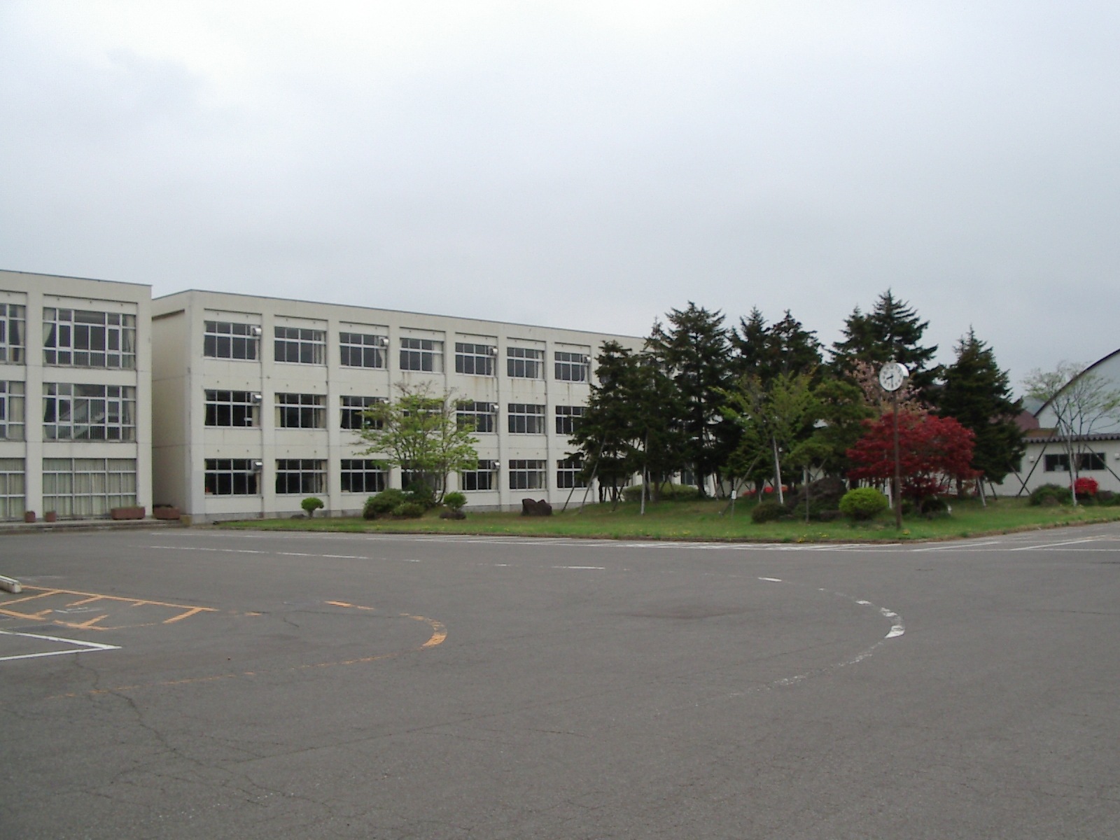 青森戸山高校の校舎を校庭側より撮影